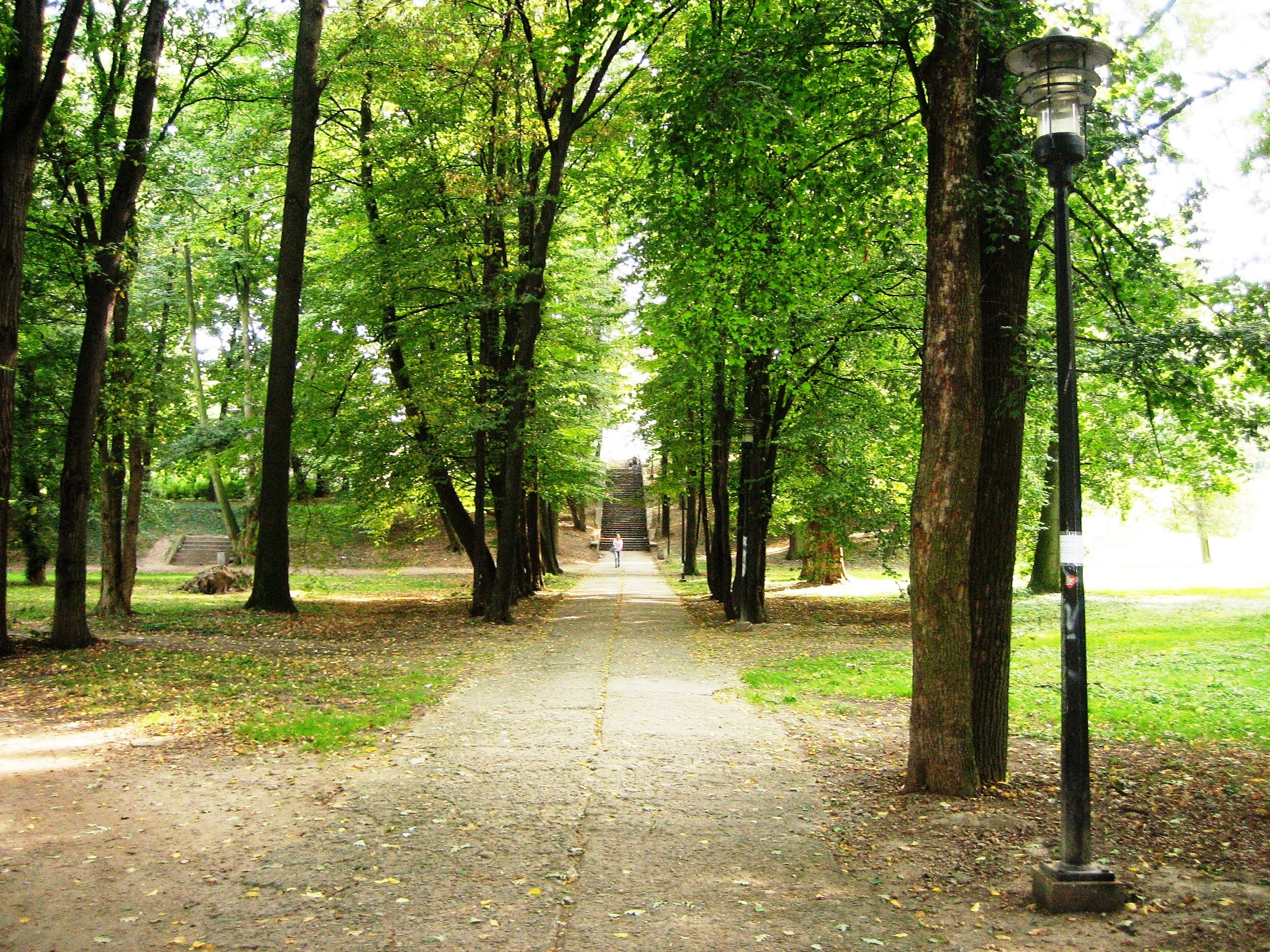 Park w Gumniskach, Tarnów - Gumniska